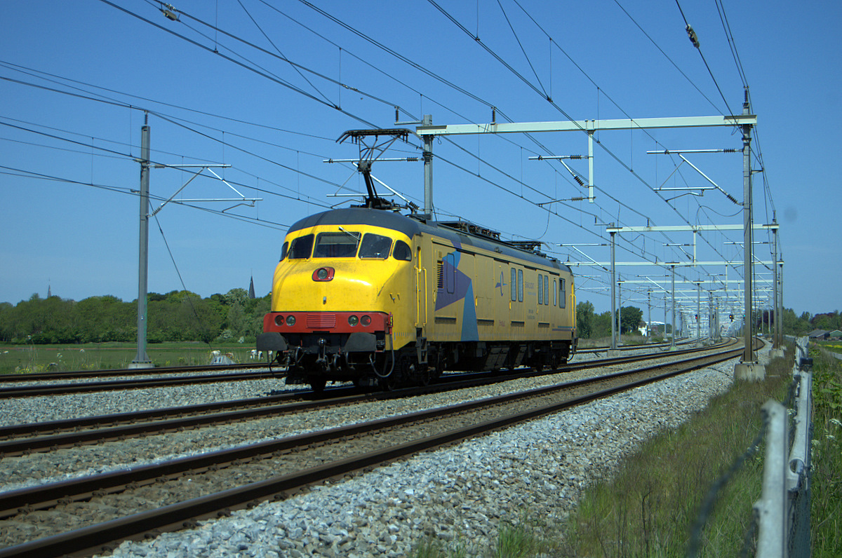 mP Jim,alweer.